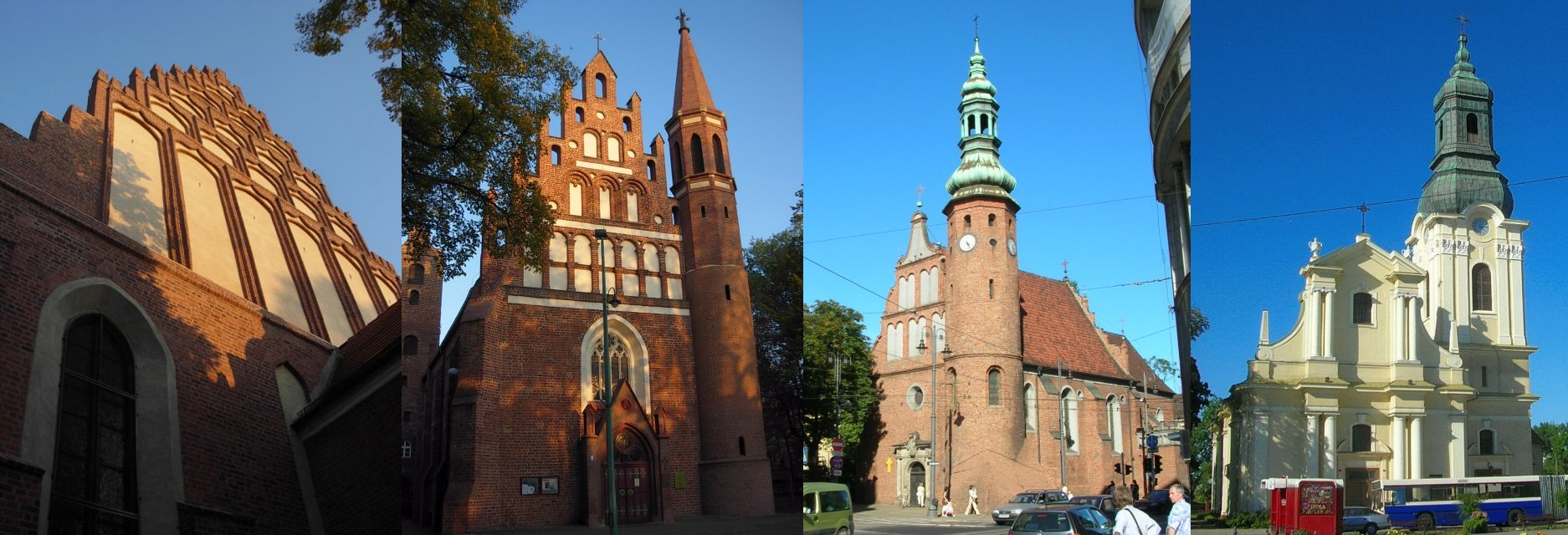 Kościoły bydgoskie: Katedra, pobernardyński, Klarysek, św. Mikołaja w Fordonie